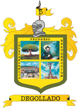 Escudo de Armas de Degollado Jalisco